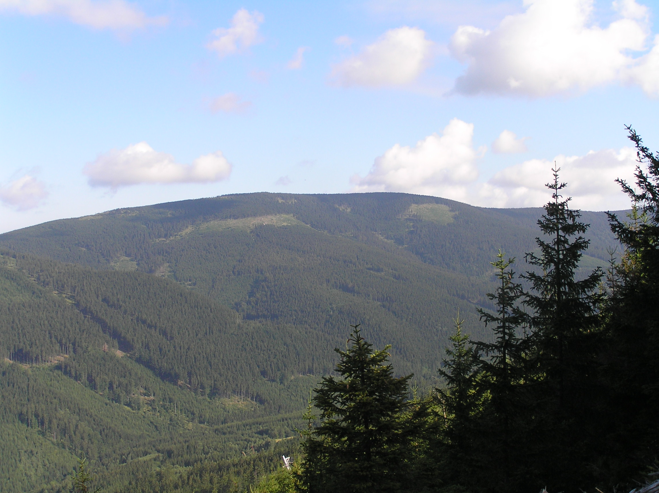 Malý Sněžník (1338 m) is the mountain near the the town Králíky, the Králický Sněžník Mountains, Czech Republic